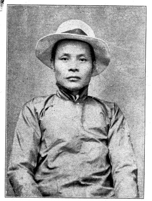 中文（台灣）: 中華民國國會議員